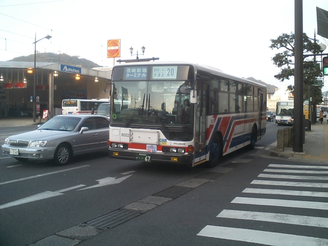 長崎バス 6002号